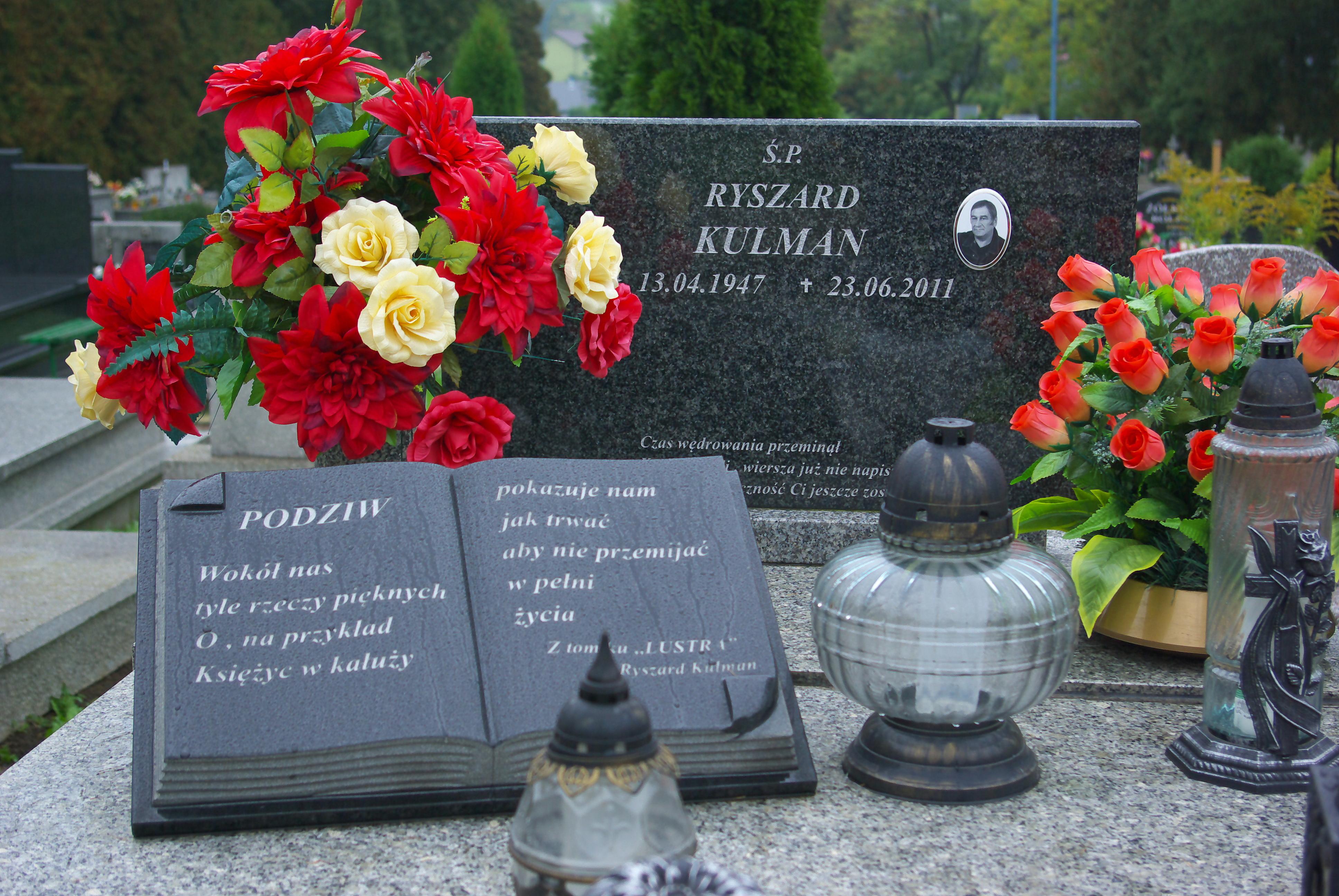 Grobowiec rodziny Kulman na Cmentarzu Centralnym w Sanoku. Pochowany Ryszard Kulman, poeta.